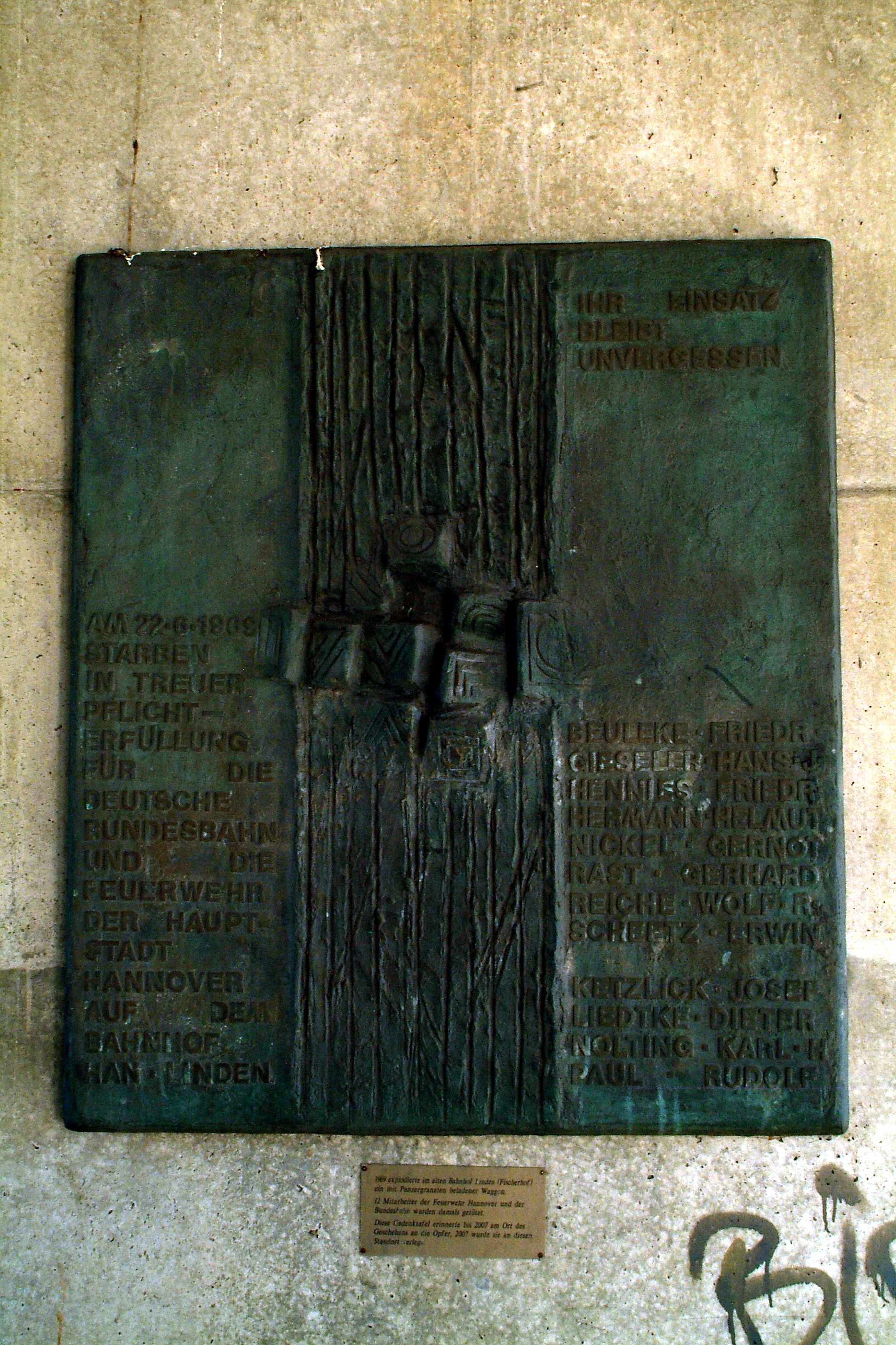 Umgesetzte Gedenktafel unterhalb der Brücke vom S-Bahnhof Hannover-Linden/Fischerhof zur Erinnerung an das Explosionsunglück auf dem alten Bahnhof Linden (Fischerhof), bei dem 12 Mitarbeiter der Feuerwehr Hannover und der Deutschen Bundesbahn ums Leben kamen. Ausweislich der Gedenktafel waren dies Friedrich Beuleke, Hans-J. Gieseler, Friedrich Hennies, Helmut Hermann, Gernot Nickel, Gerhard Rast, Wolf R. Reiche, Erwin Scheetz, Josef Ketzlick, Dieter Liedtke, Karl H. Nolting und Rudolf Paul.